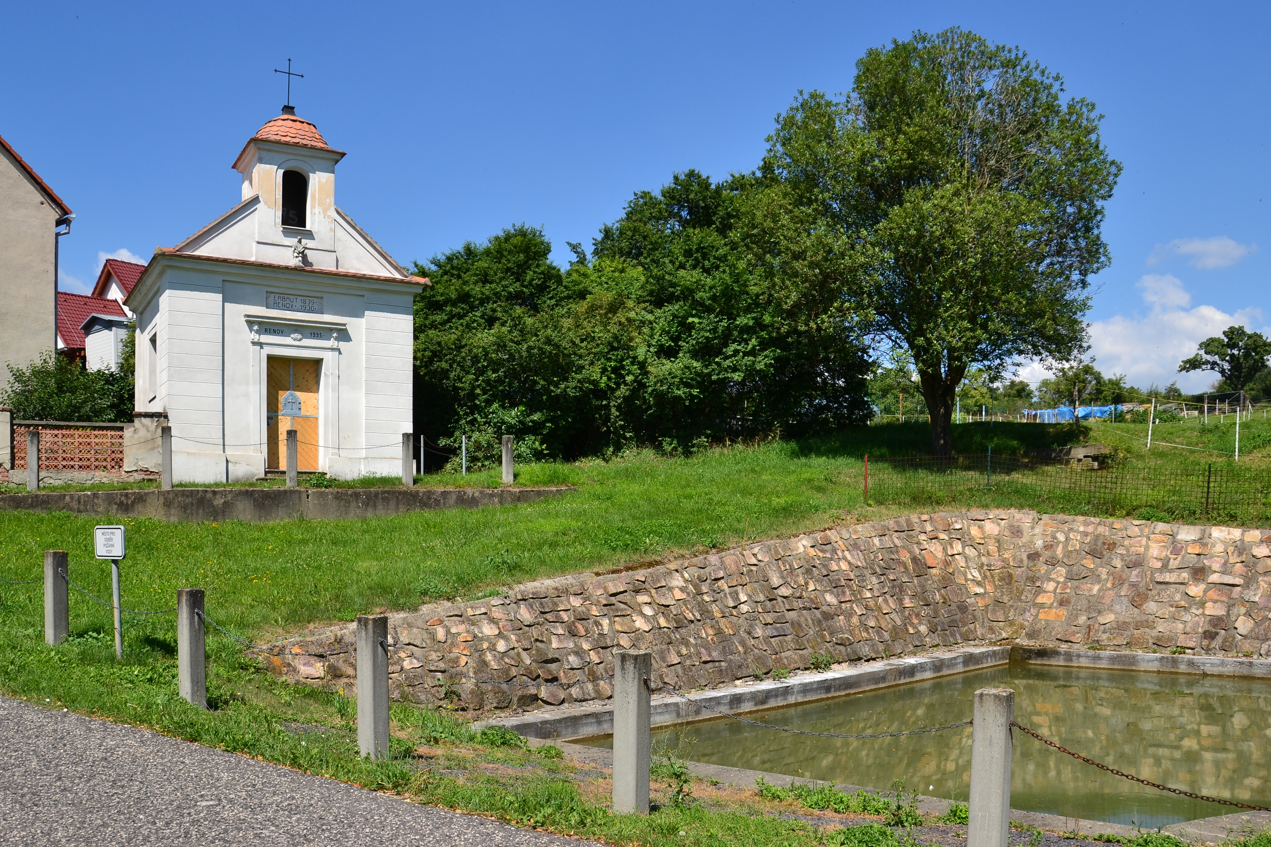 Kaple